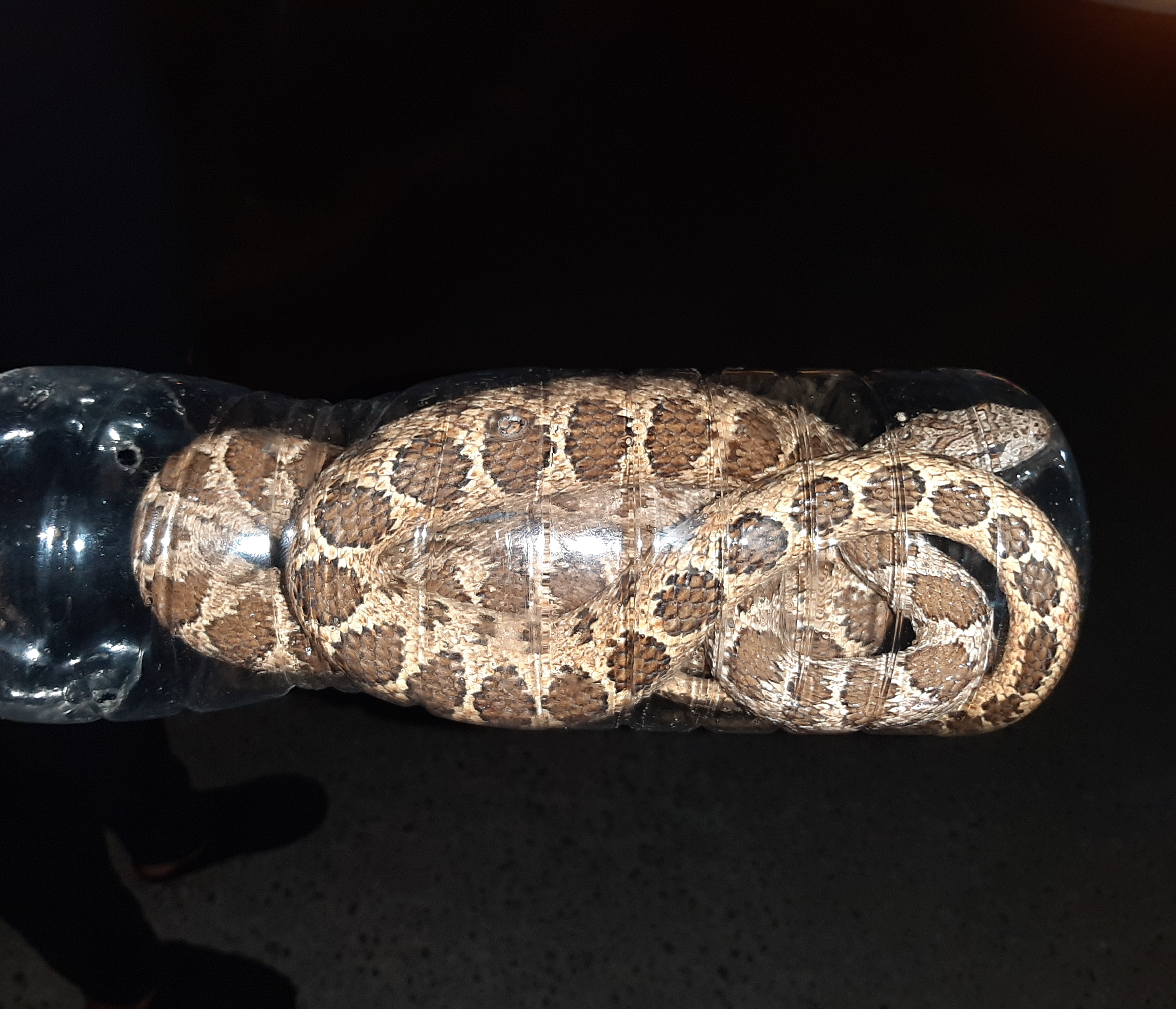 أفعى بقلاوية في فلسطين الصورة التقتطها بنفسي